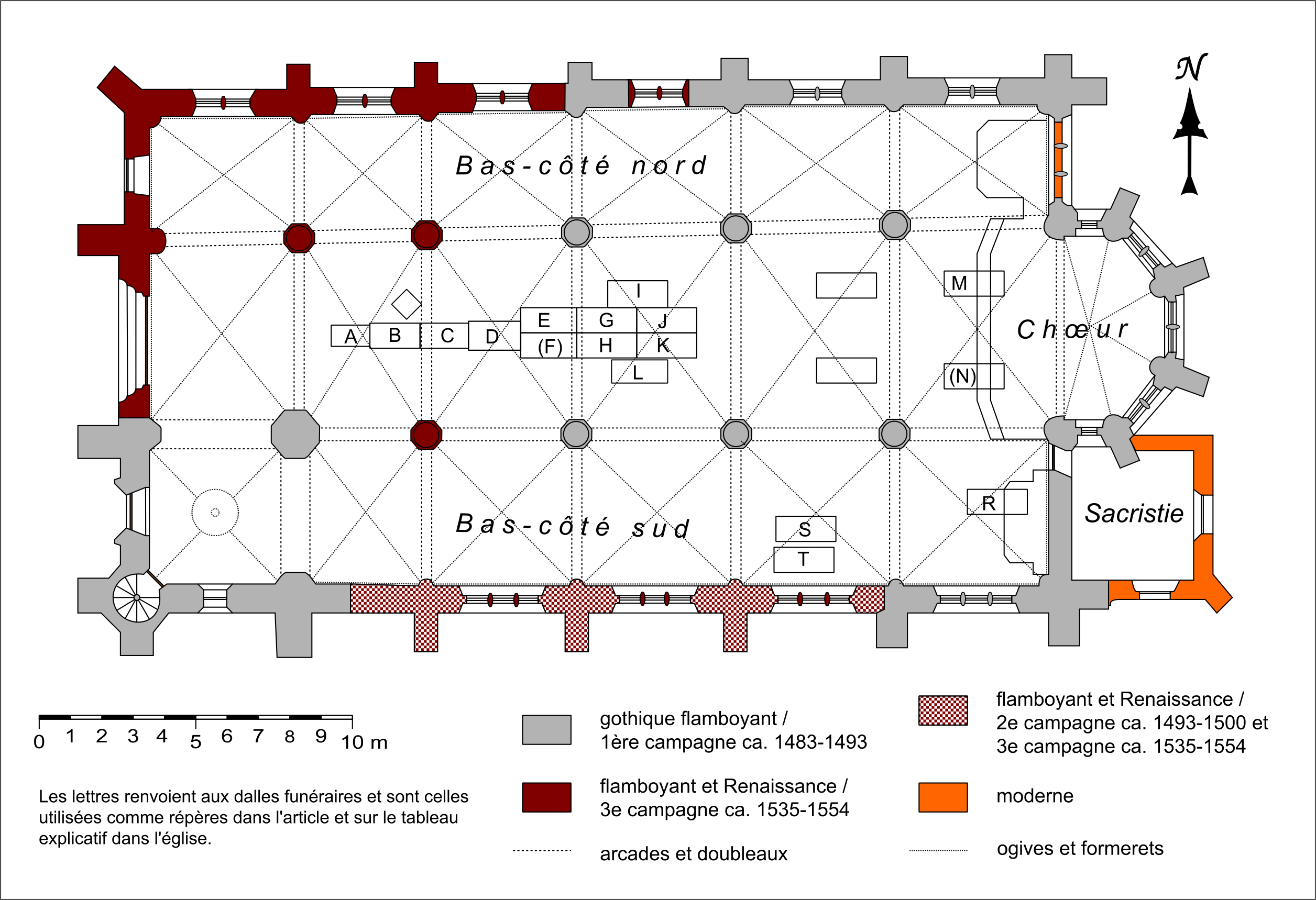 Plan de l'église avec indication de la situation des dalles funéraires (répères A à T).